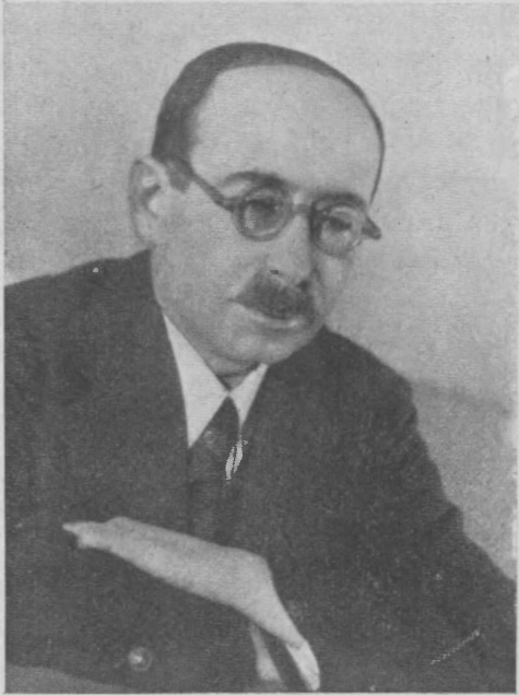 zdjęcie opublikowane w czasopiśmie Filomata, 1938, L.101, str. 521